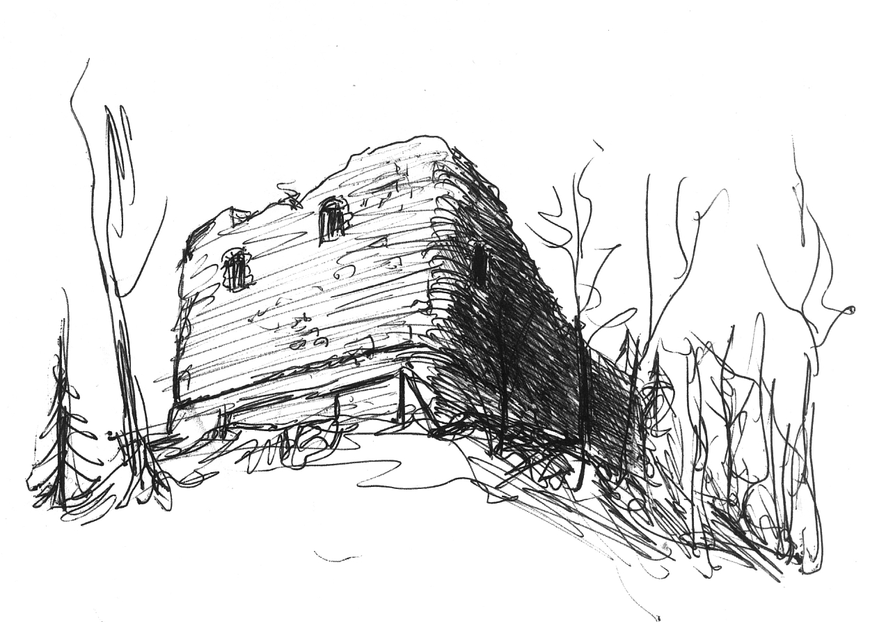 Burg Neuenfels, eigenhändige Zeichnung